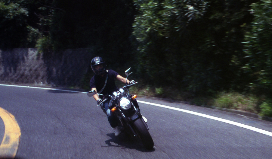 自動二輪車におけるバンク